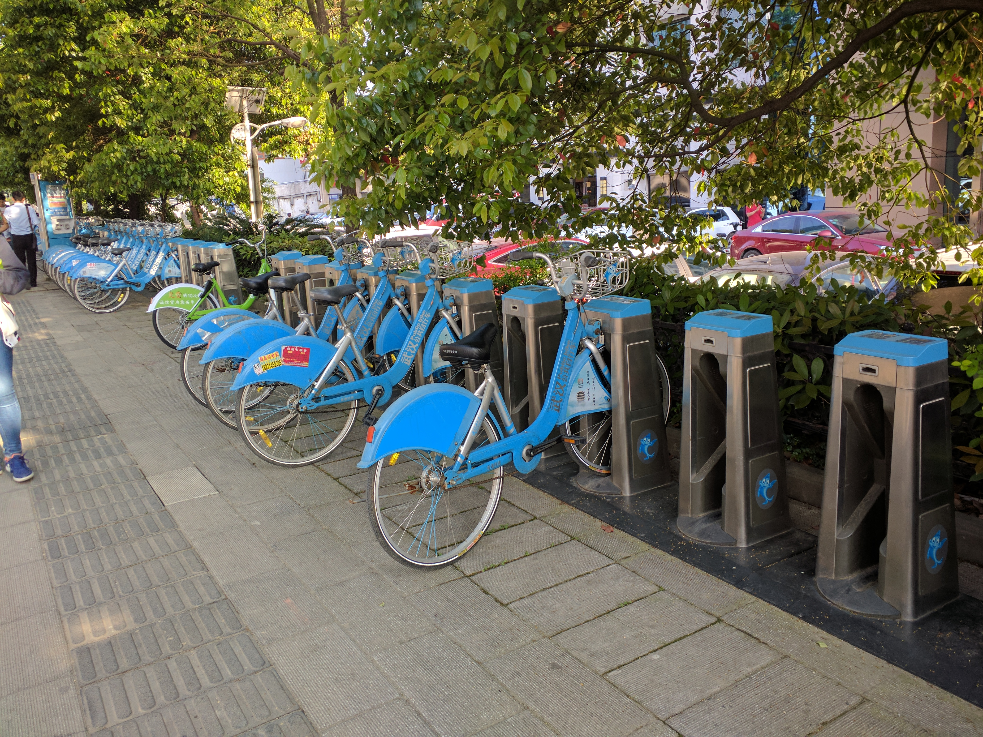 中文（中国大陆）: 武汉公共自行车居然之家站（岳家嘴地铁站附近），蓝色车为该系统自行车